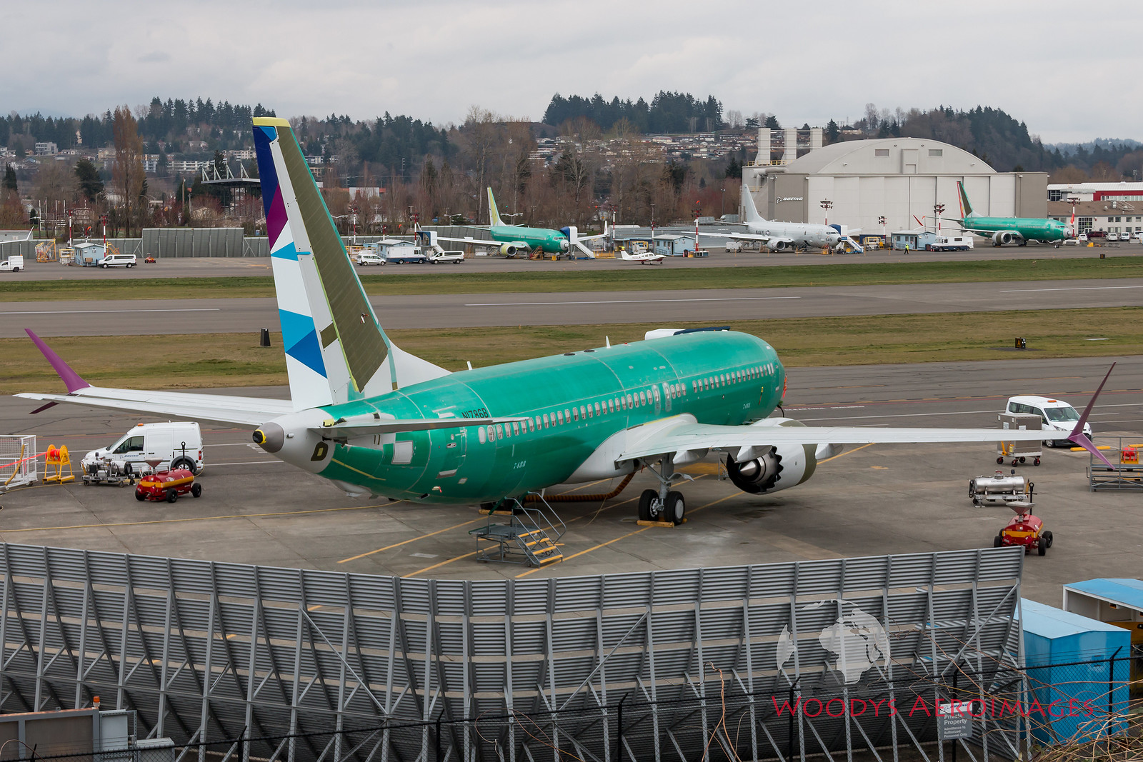 Новый Boeing 737 MAX 8 авиакомпании NordStar